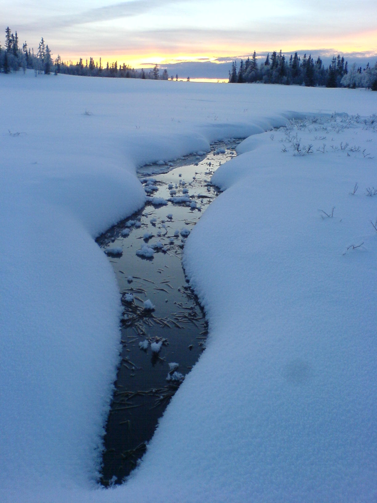 Henvålens naturreservat i Härjedalen på vintern.